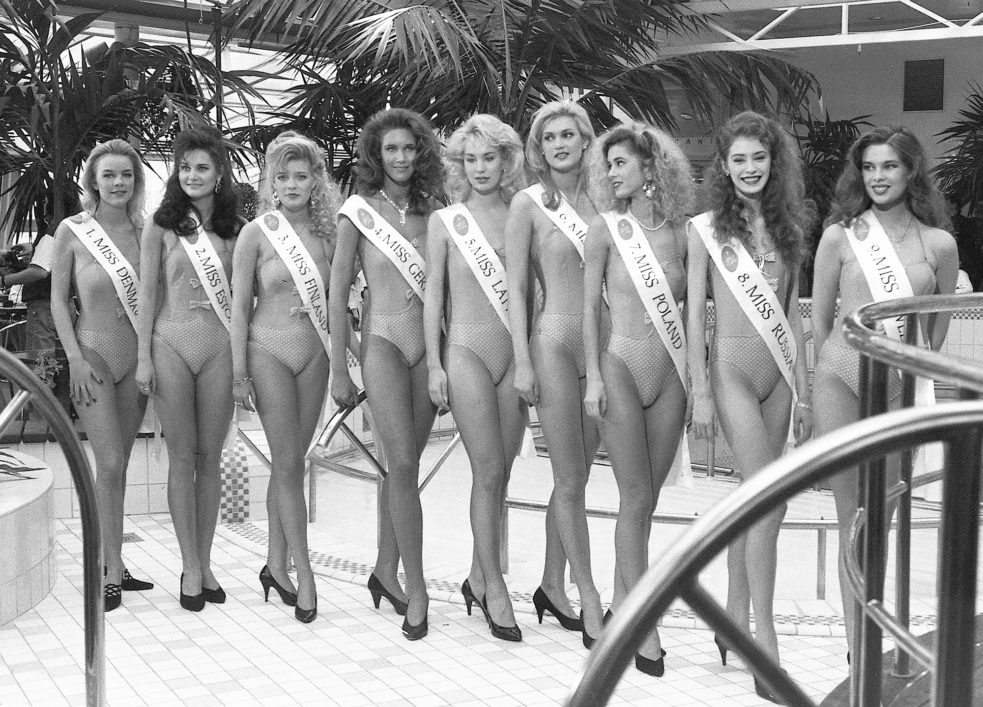 Miss Baltic Sea 93